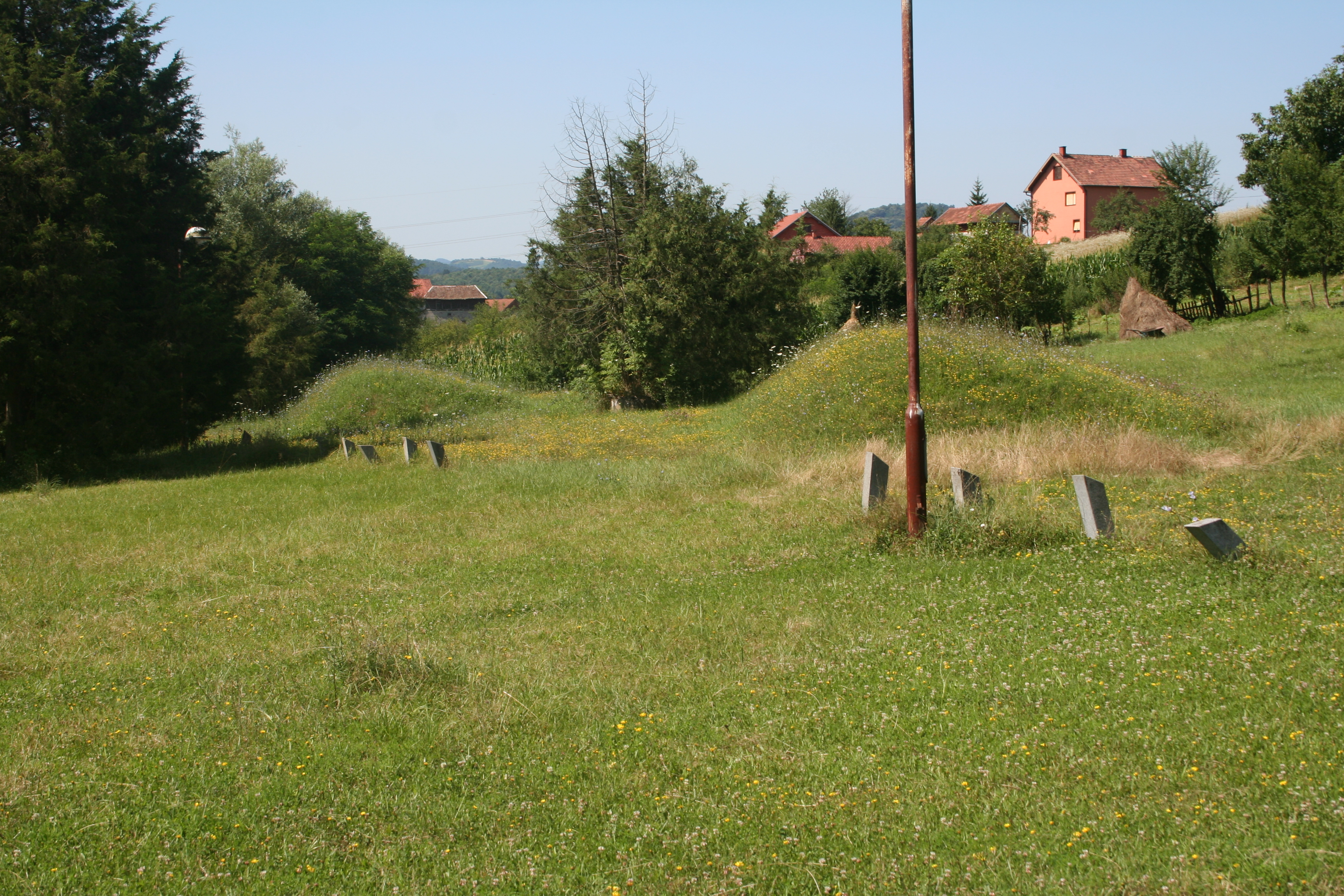 Spomenik i kosturnica, mesto streljanja, Draginac